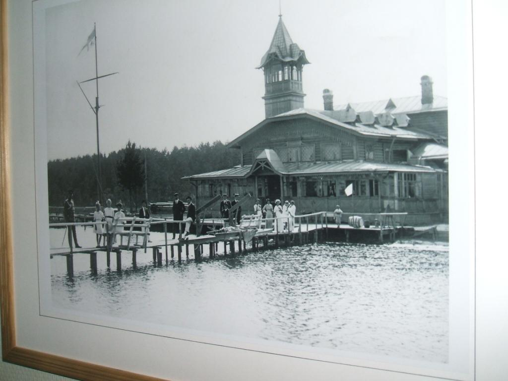 яхтклуб на Разливе до 1917 года